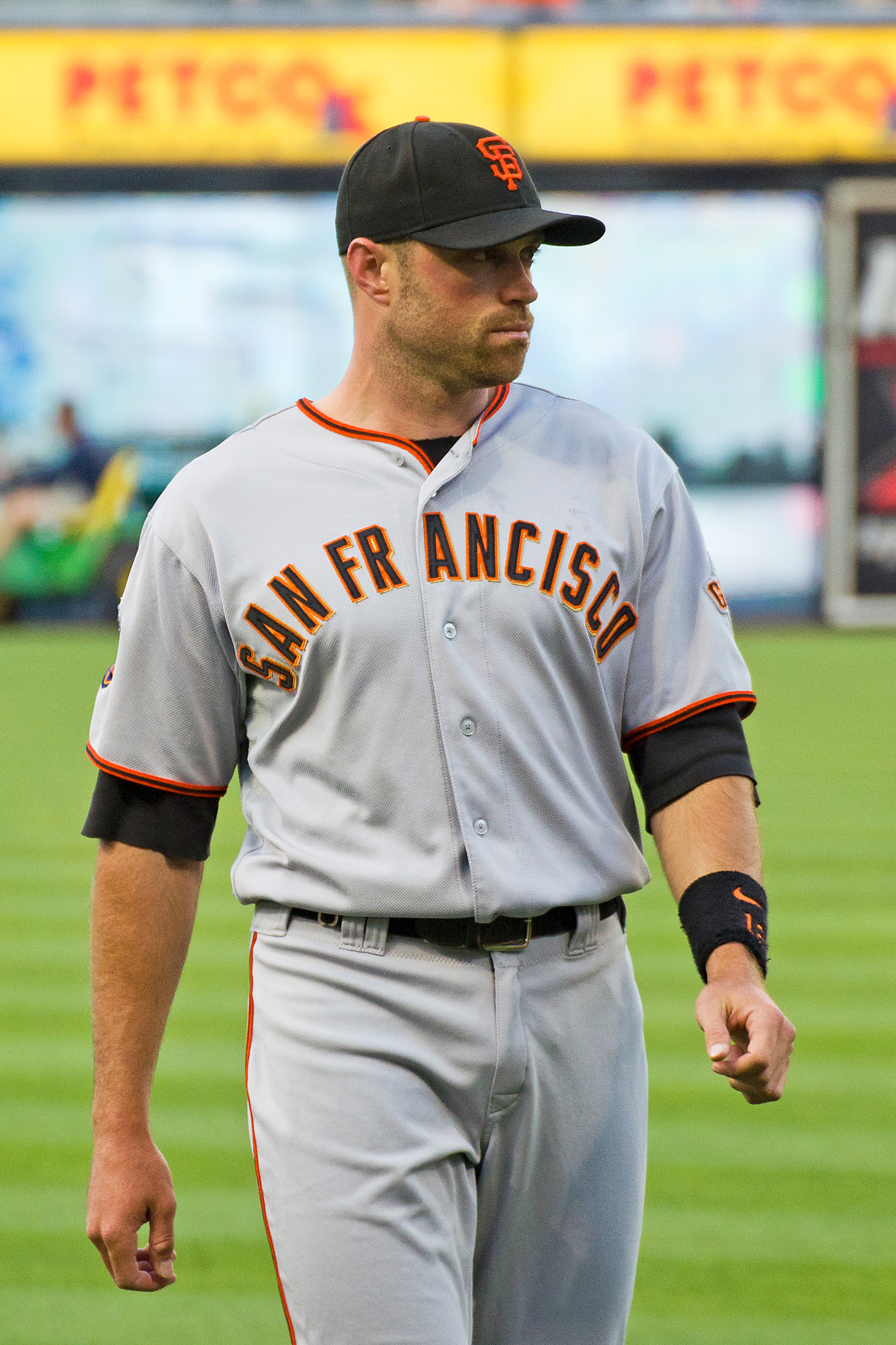 Nate Schierholtz